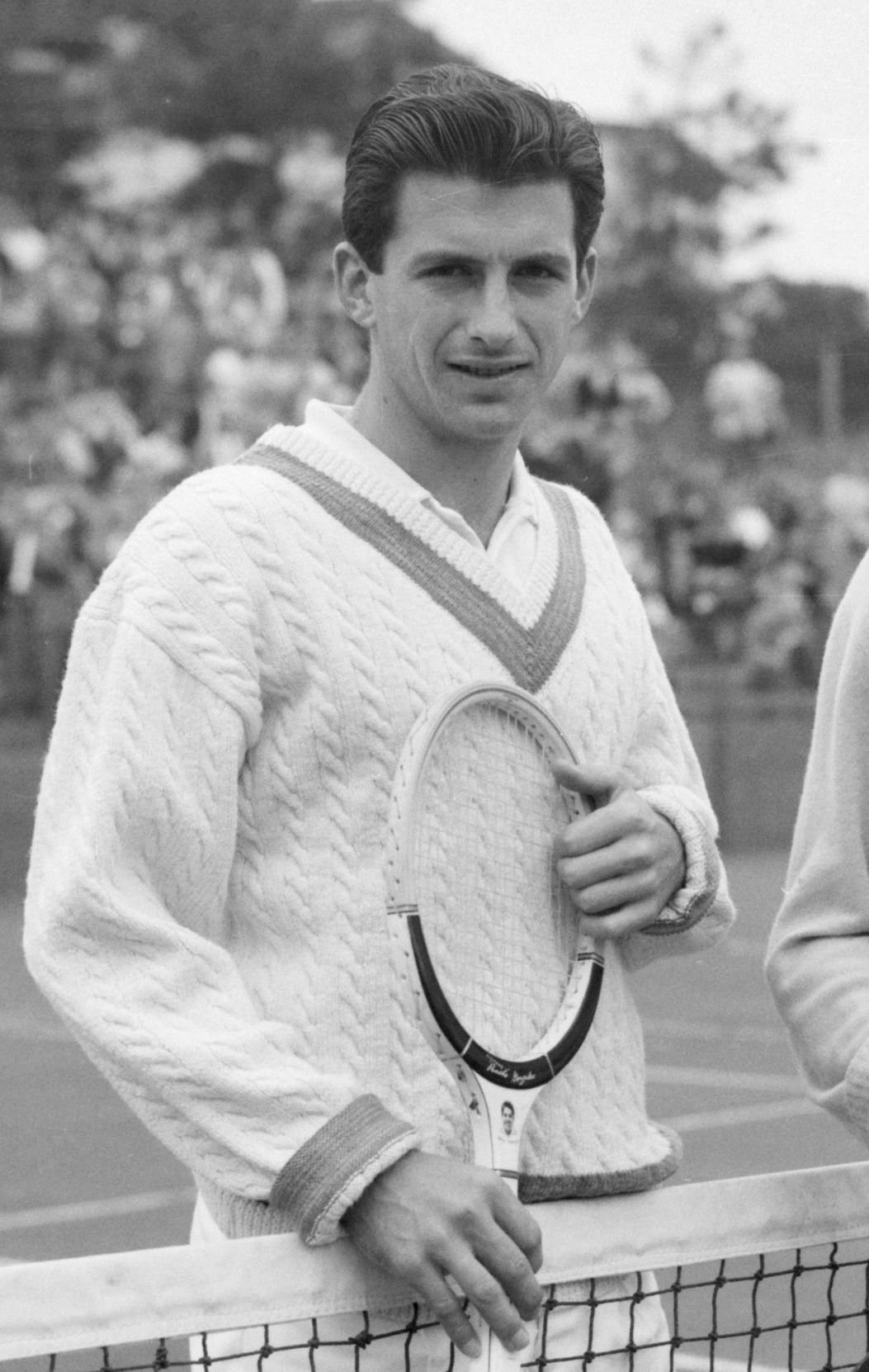 Tennisdemonstratie door Cooper